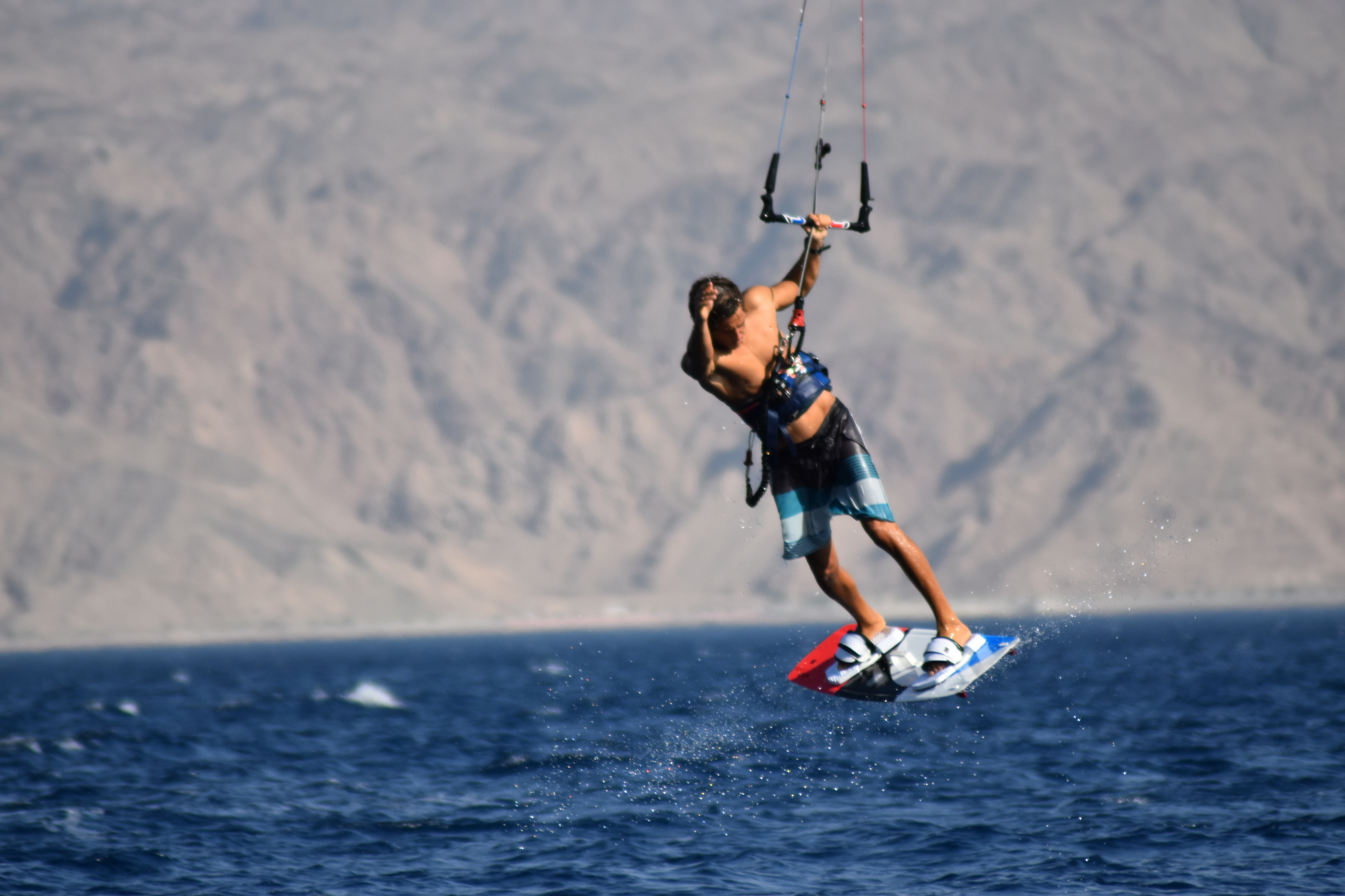 ניב אפלבוים תיכון רוטברג